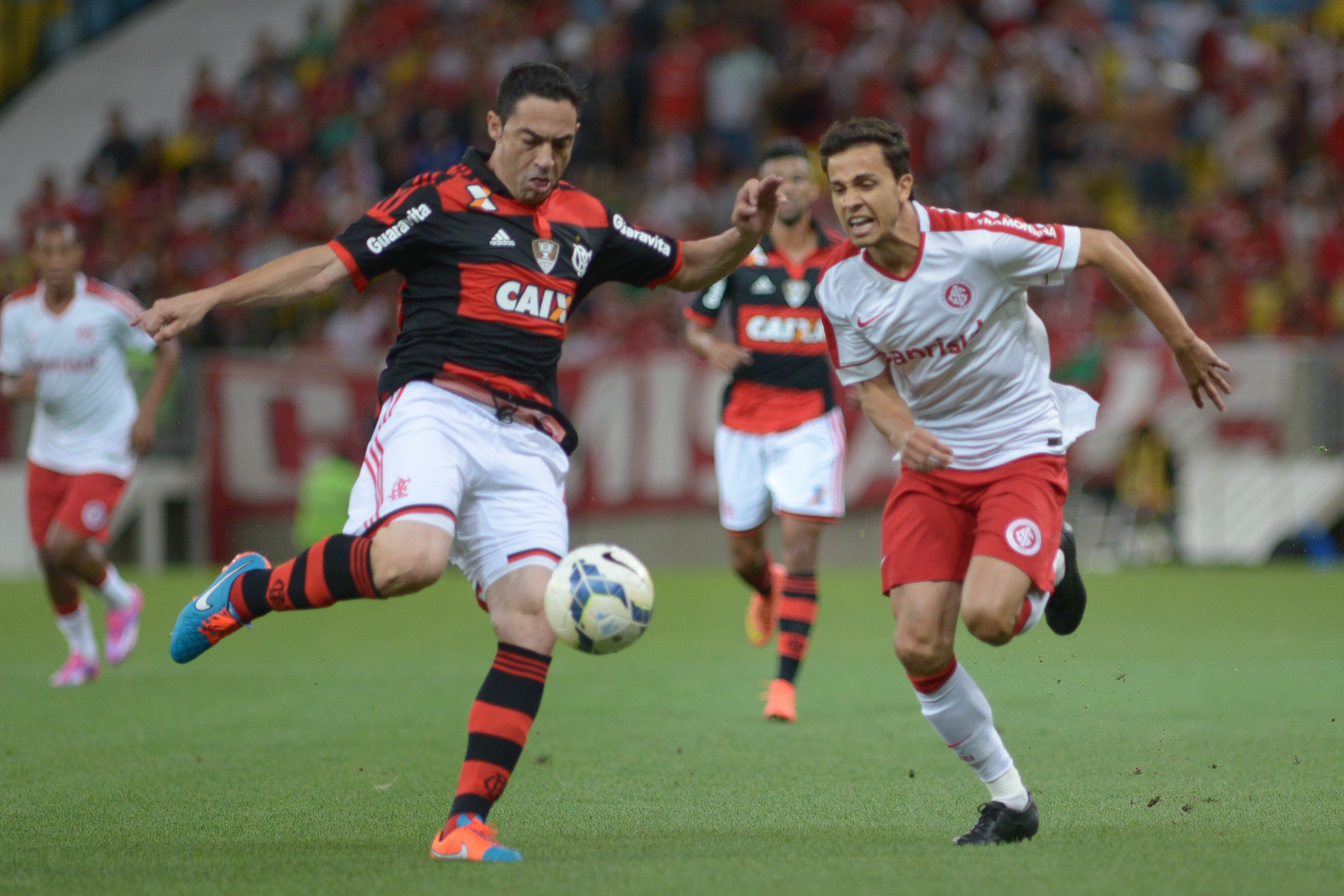 RIO DE JANEIRO, RJ - 22/10/2014: FLAMENGO X INTERNACIONAL - Chicão e Alex dividem a bola, primeiro tempo. Flamengo x Internacional realizada no Estádio do Maracanã, válida pela 30a rodada do Campeonato Brasileiro . (Foto: Armando Paiva / Fotoarena)